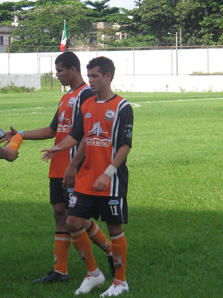 Jogadores do Riostrense Esporte Clube, em 2009. Foto de Paulo Roberto Rodrigues.